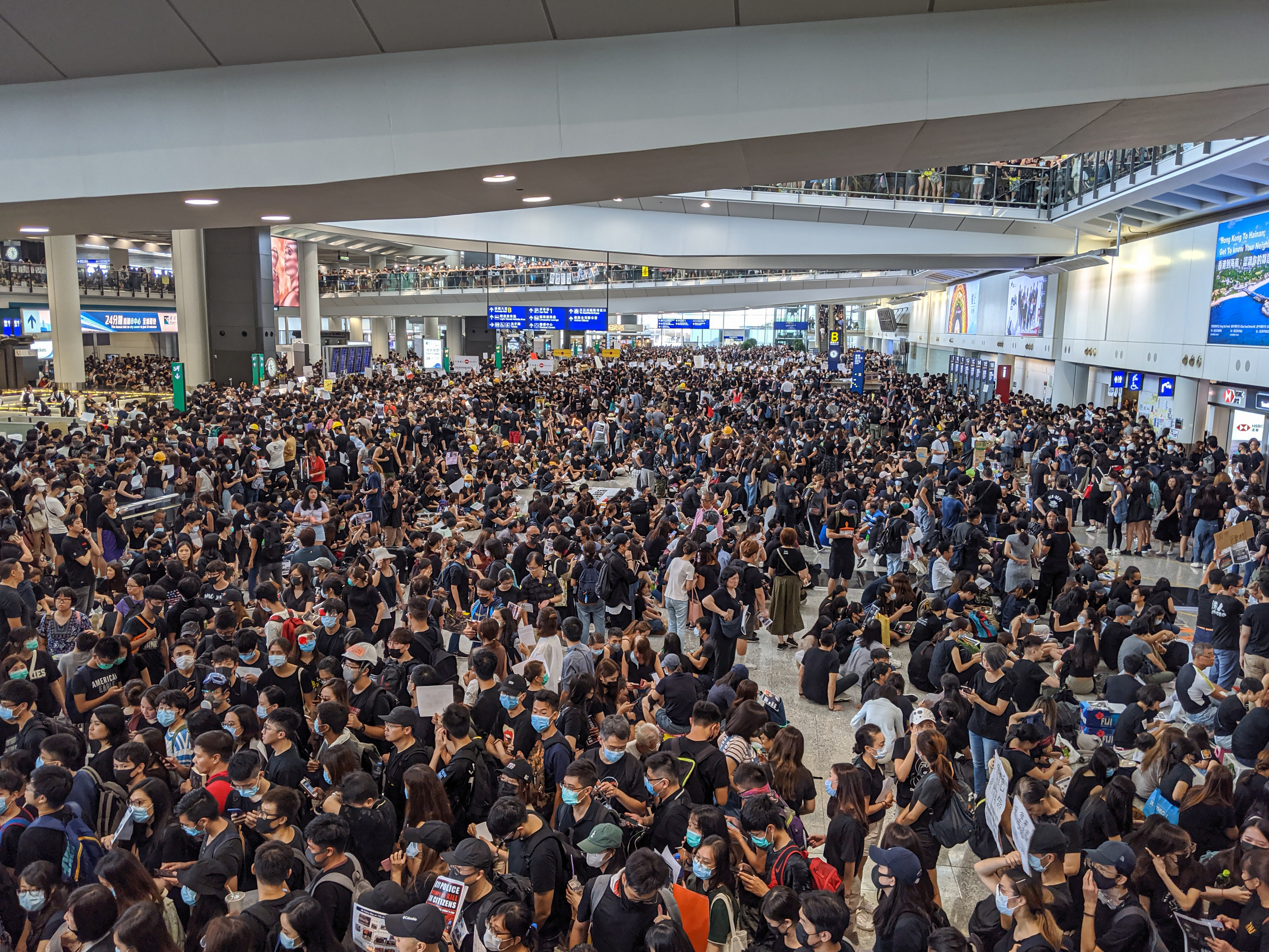 IMG_20190812_155703